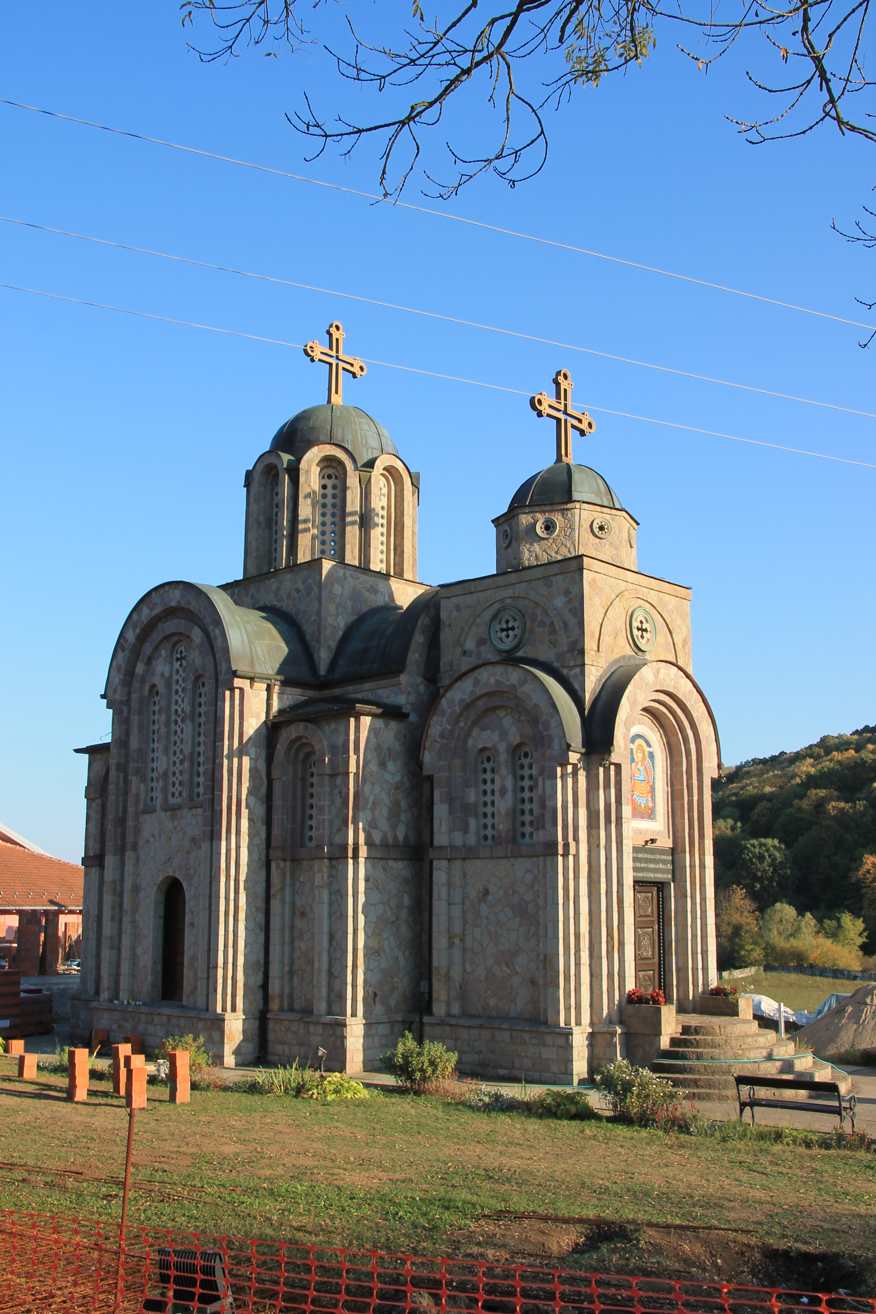 Crkva Sv. Georgija (Viševac)